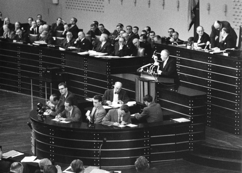 2. Lesung der Pariser Verträge im Deutschen Bundestag am 25. Februar 1955